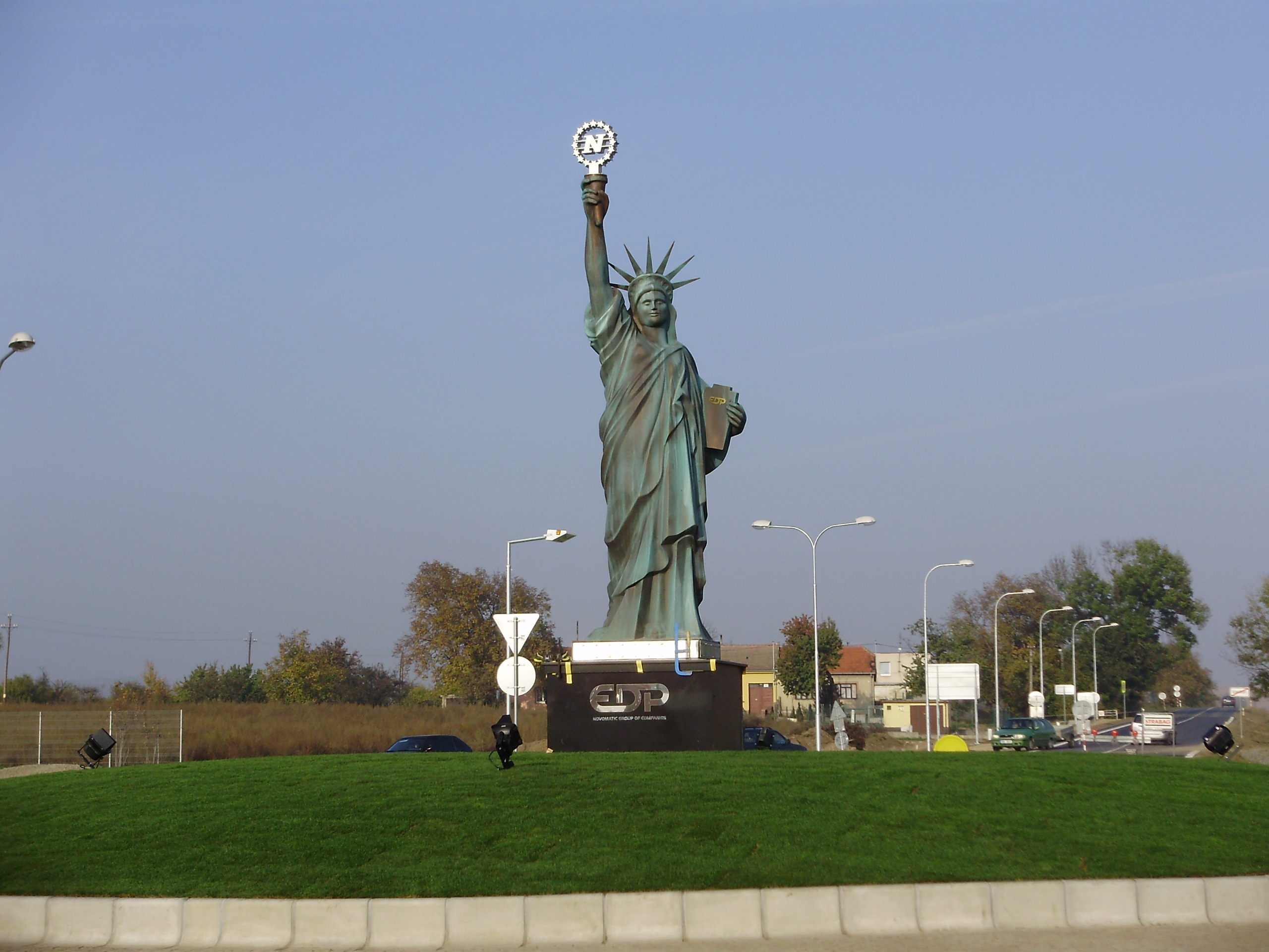 Socha Svobody v Komořanech